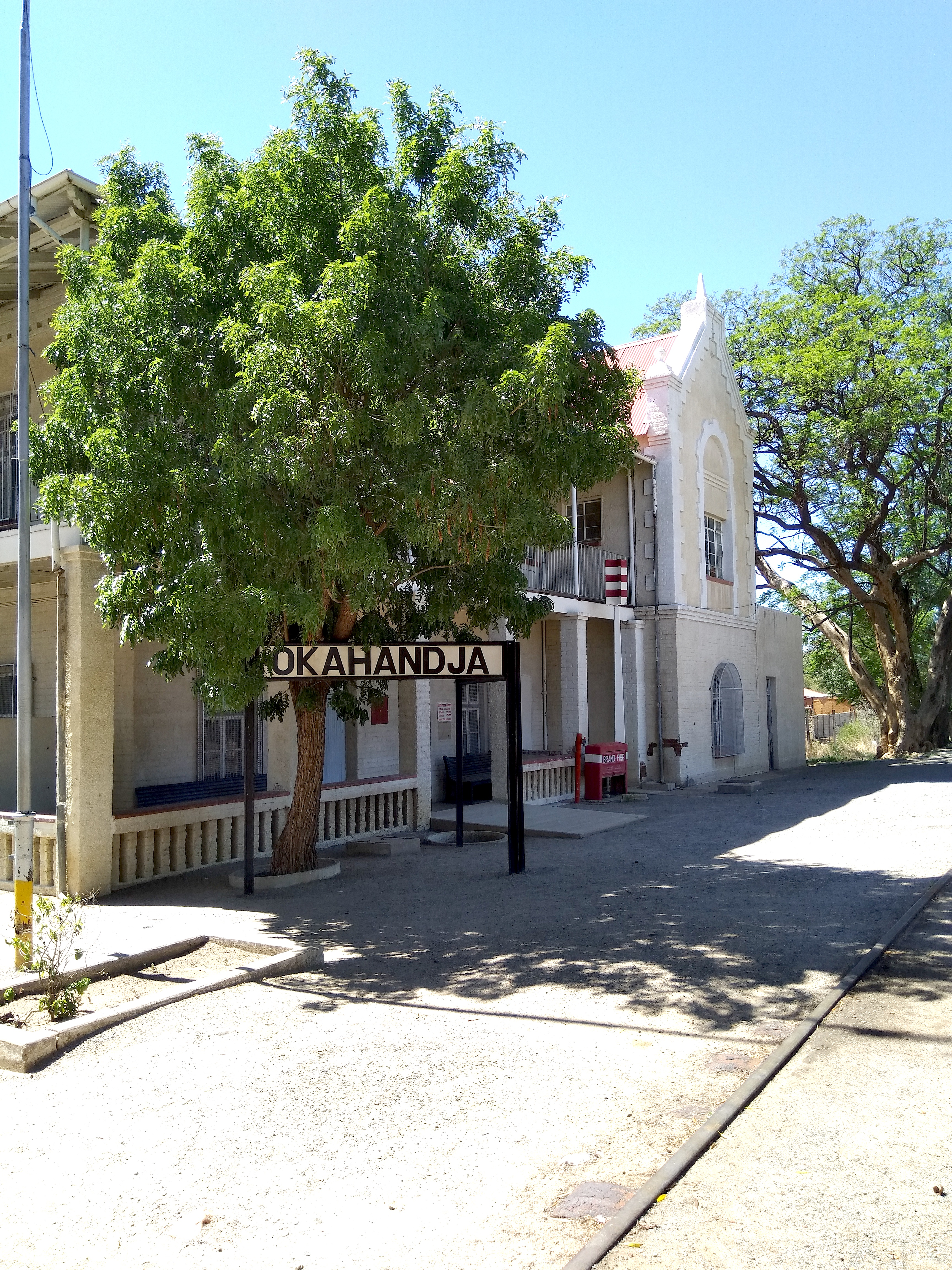 Okahandja Bahnhof (2018)